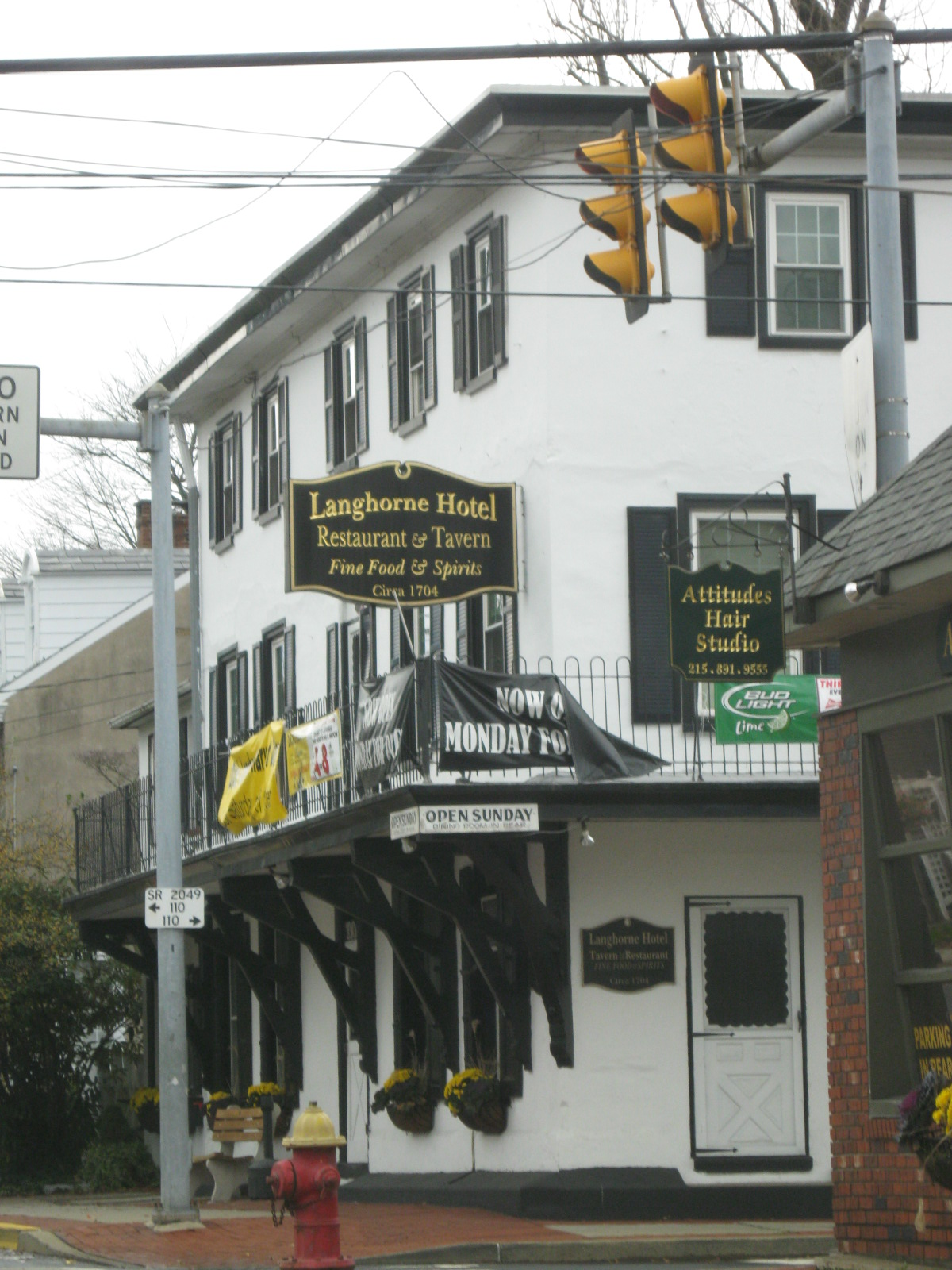 Langhorne, Pennsylvania